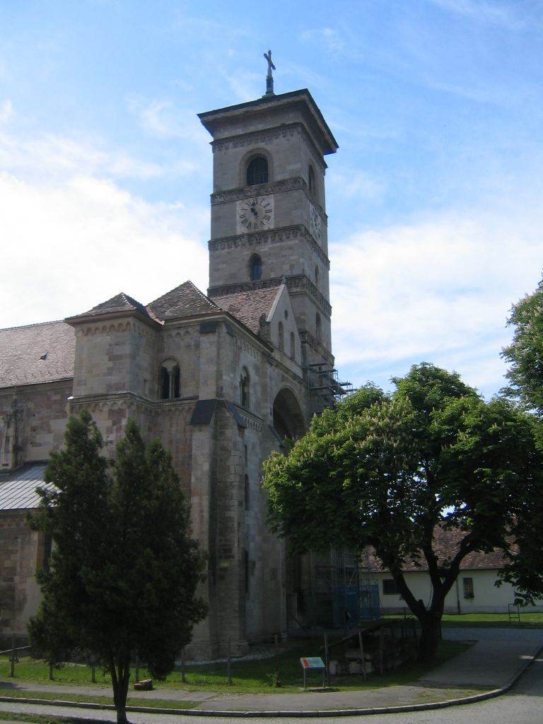 Biserica catolică din Alba Iulia, România